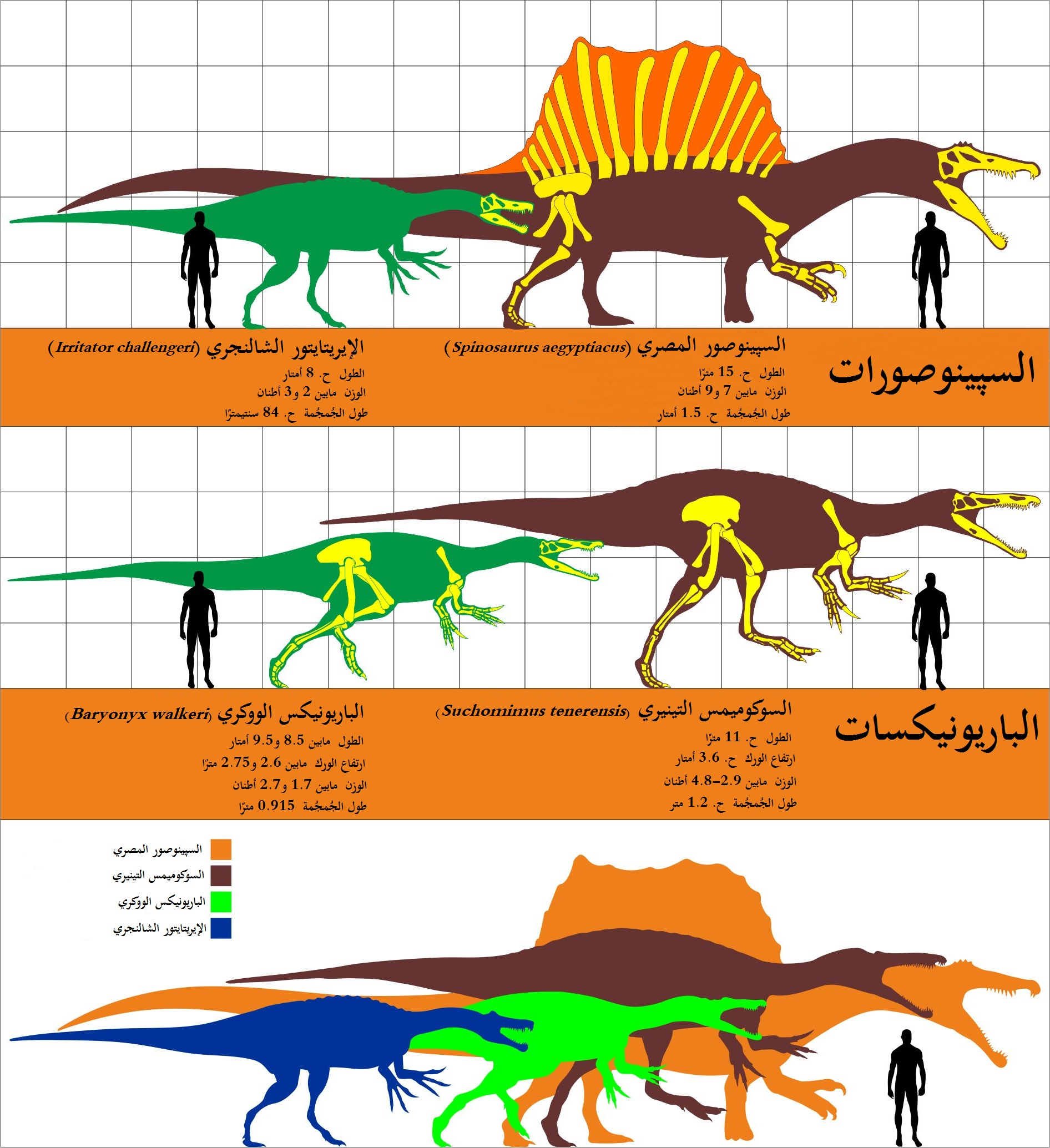 رسمٌ بيانيّ يُقارنُ حجم أجناس الديناصورات المُنتمية إلى فصيلة السپينوصوريَّات.